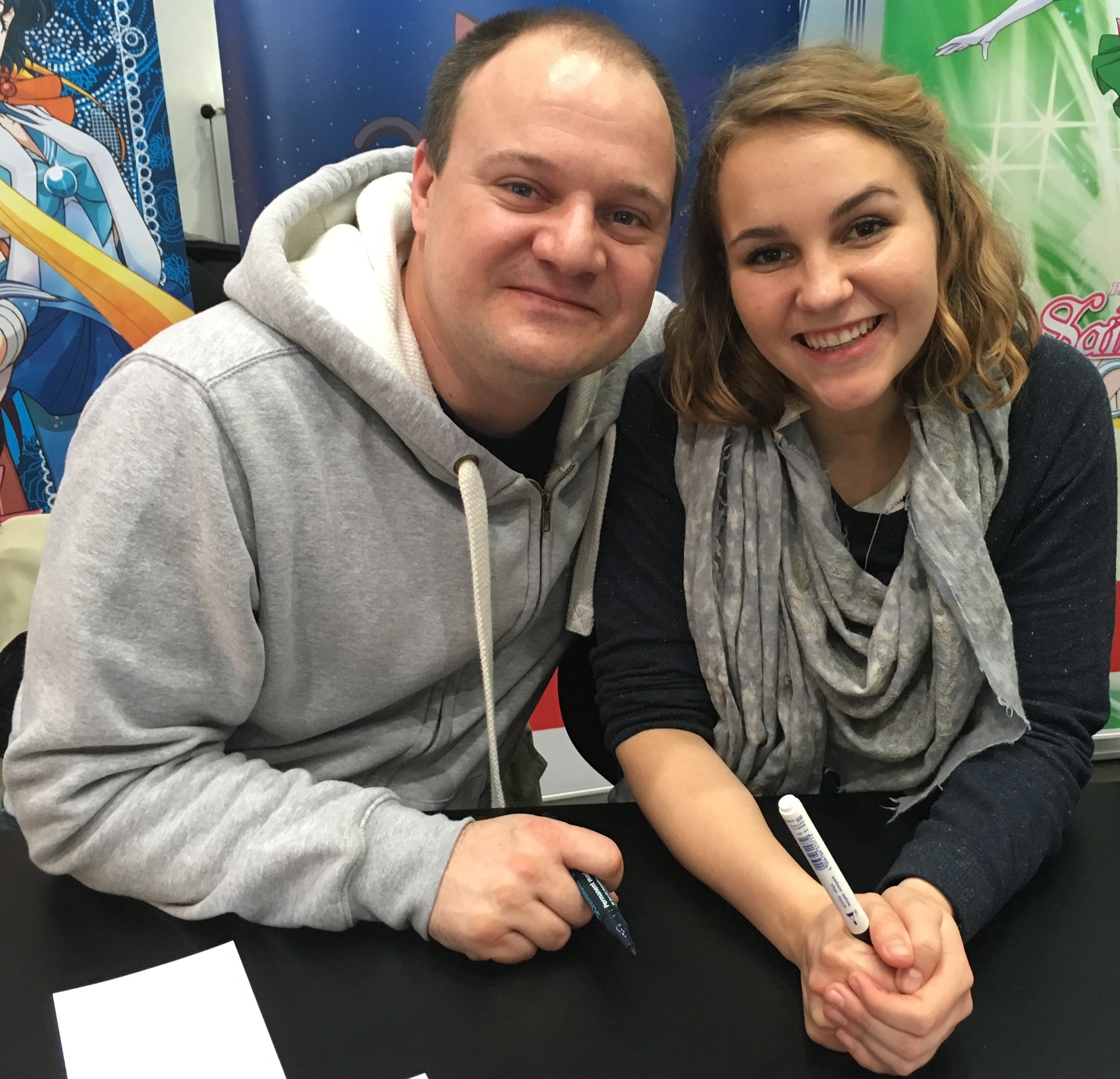 Die Synchronsprecher Dominik Auer und Maresa Sedlmeir bei einer Autogrammstunde auf der Leipziger Buchmesse 2016.